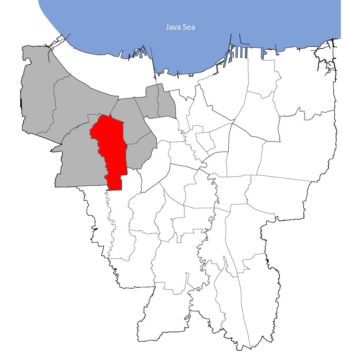 Kebon Jeruk;onderdistrict (Kecamatan) van West-Jakarta